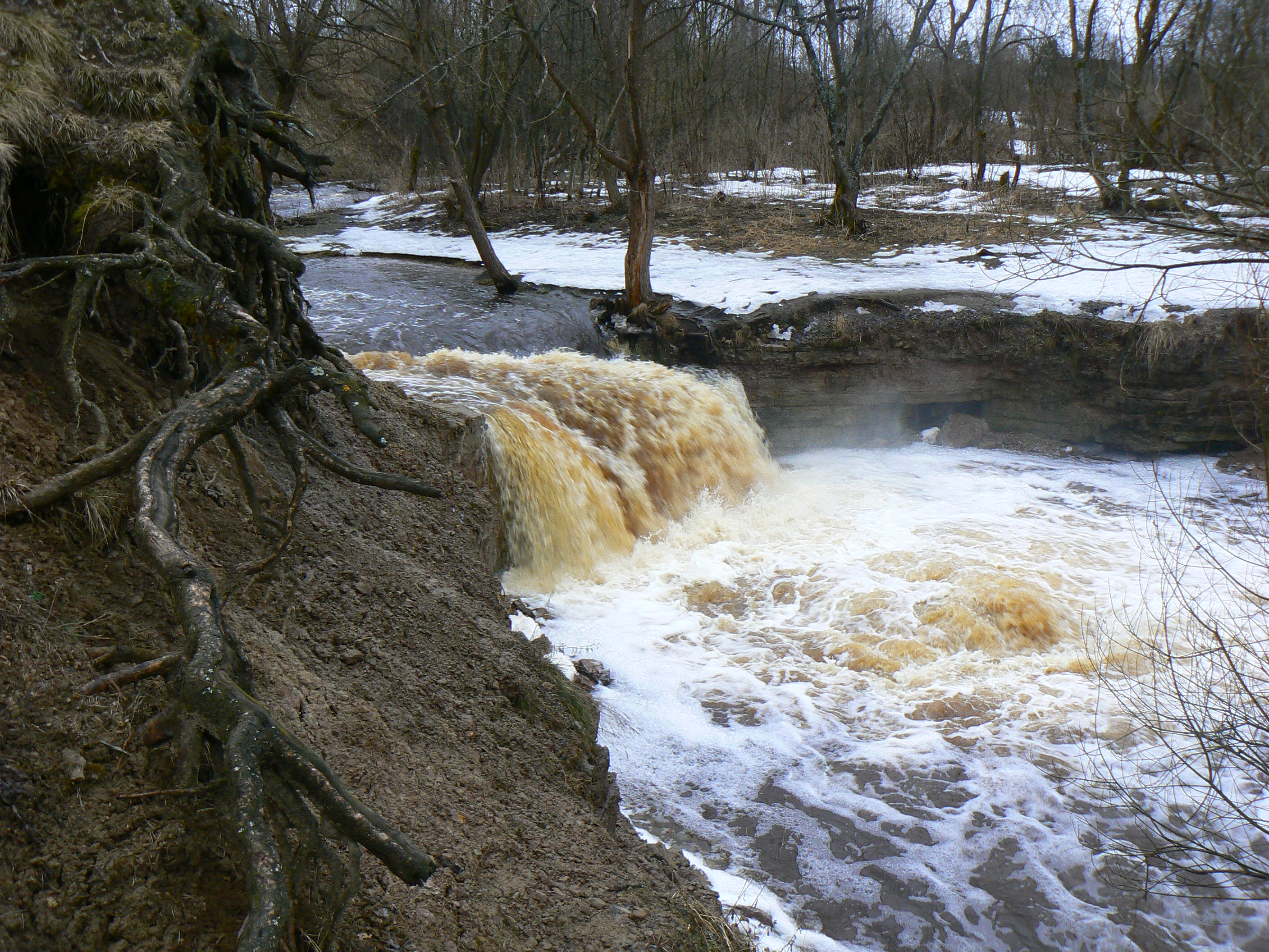 Саблинский водопад в период половодья. 15 апреля 2009 г.